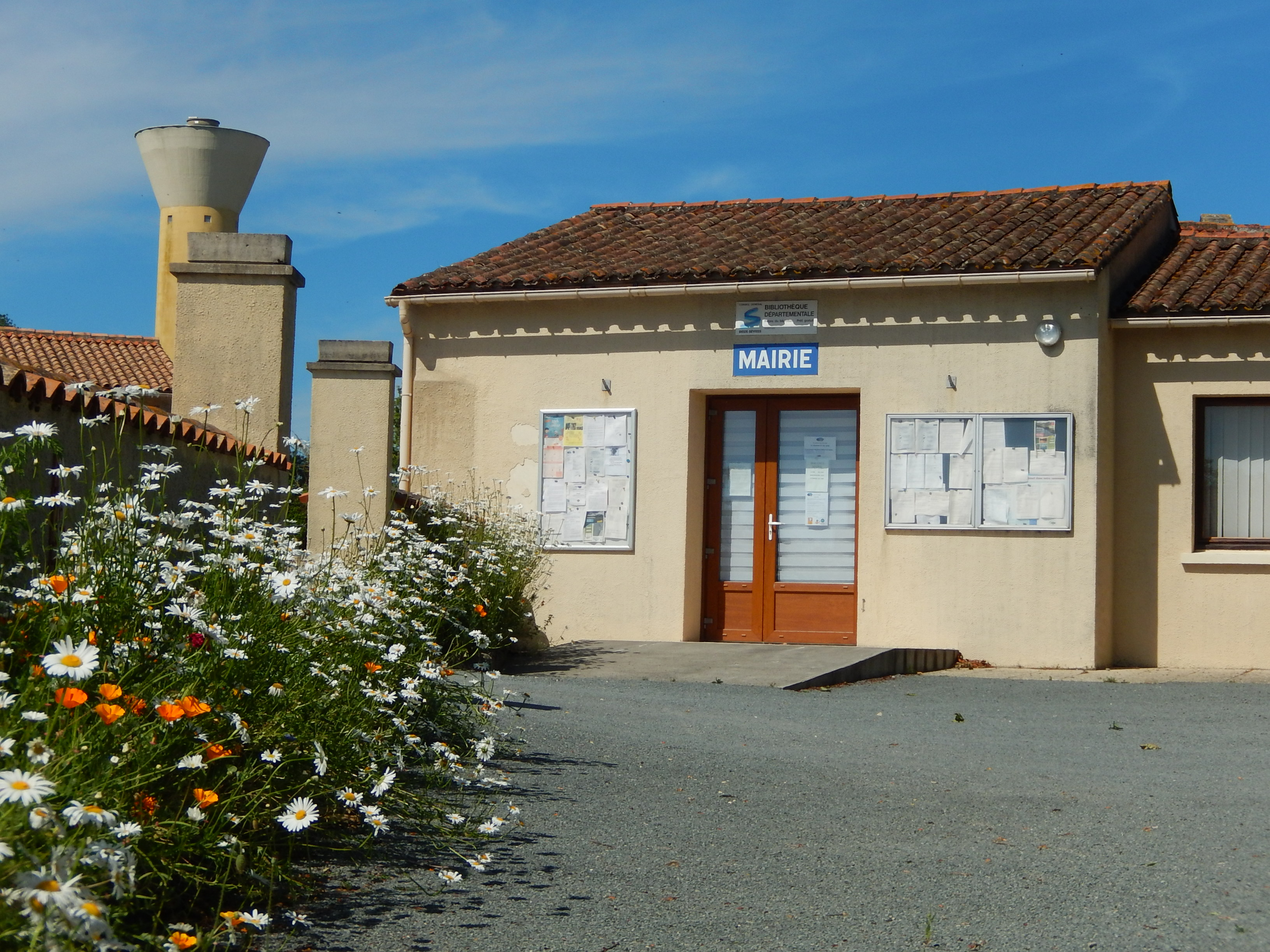 La mairie de la commune deux-sévrienne de Loubigné.